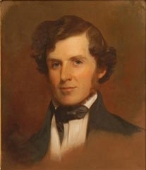 Samuel Phillips Lee, Blair House